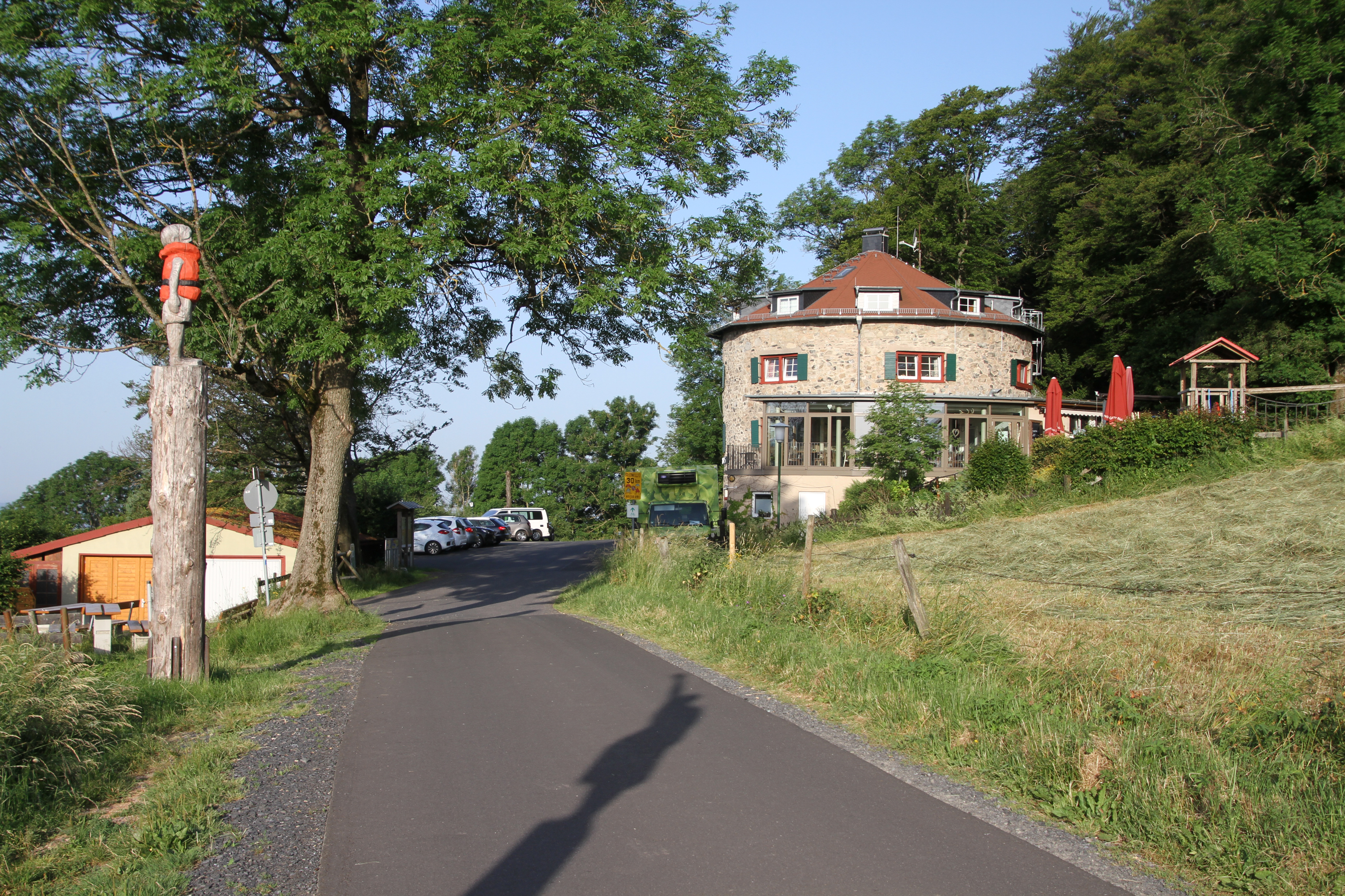 Maulkuppe in der Rhön in Hessen